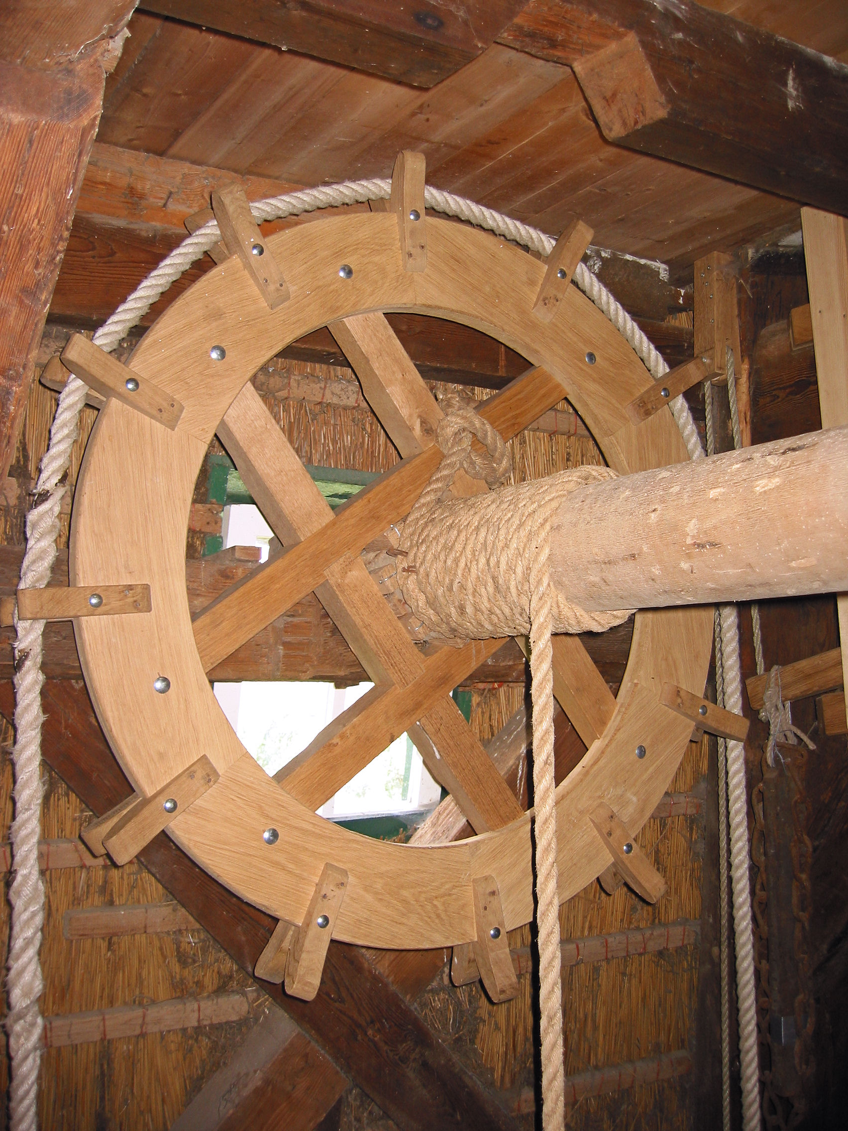 Molen De Hoop in Appel, gaffelwiel, Gelderland, the Netherlands